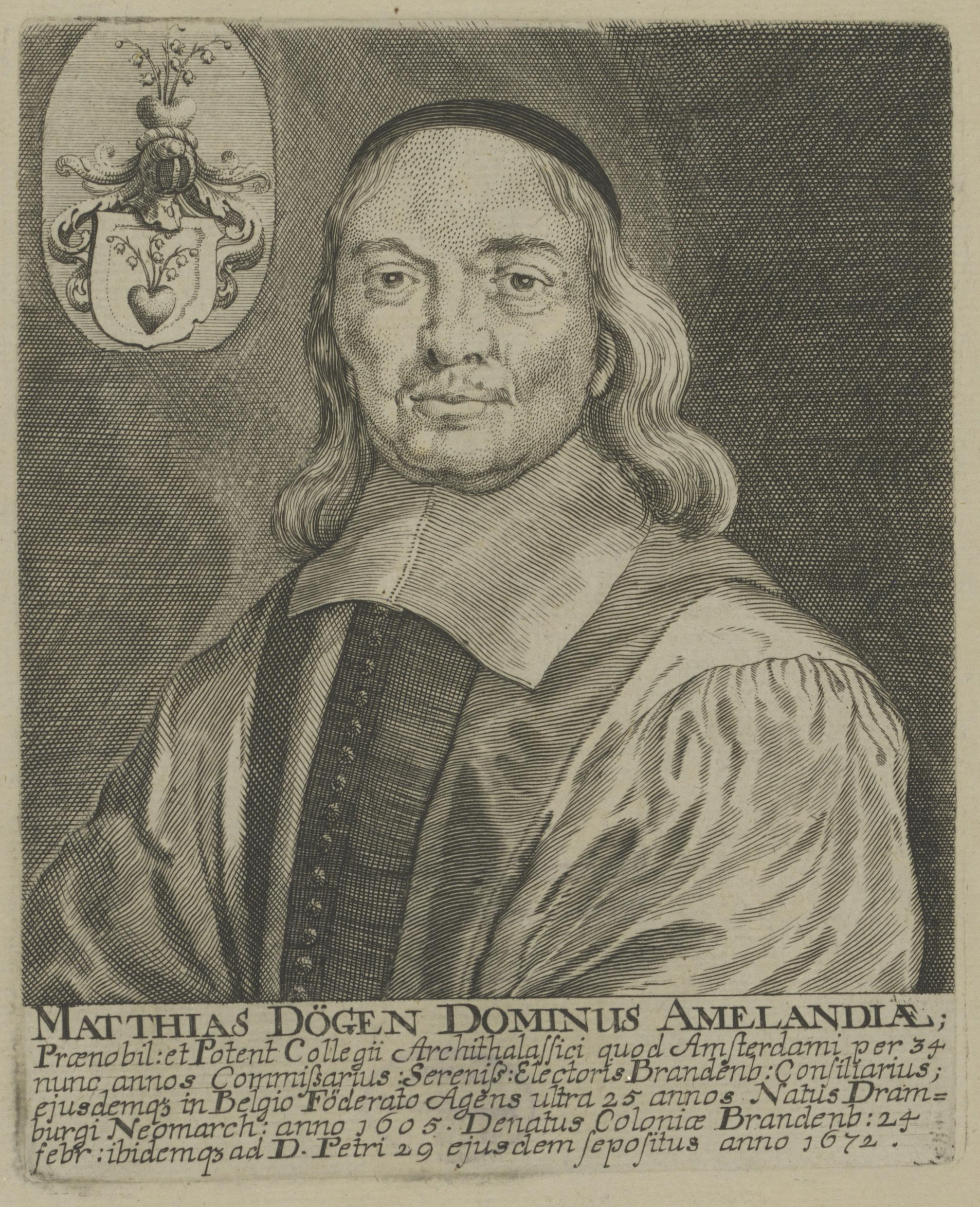 Bildnis des Festungsbaumeisters Matthias Dögen Kupferstich, 140 x 117 mm (Platte) Berlin, Staatsbibliothek zu Berlin - Preußischer Kulturbesitz, Handschriftenabteilung, Inventar-Nr. Portr. Slg / Slg Hansen / Staats- und Standespersonen / Bd. 3 / Nr. 9